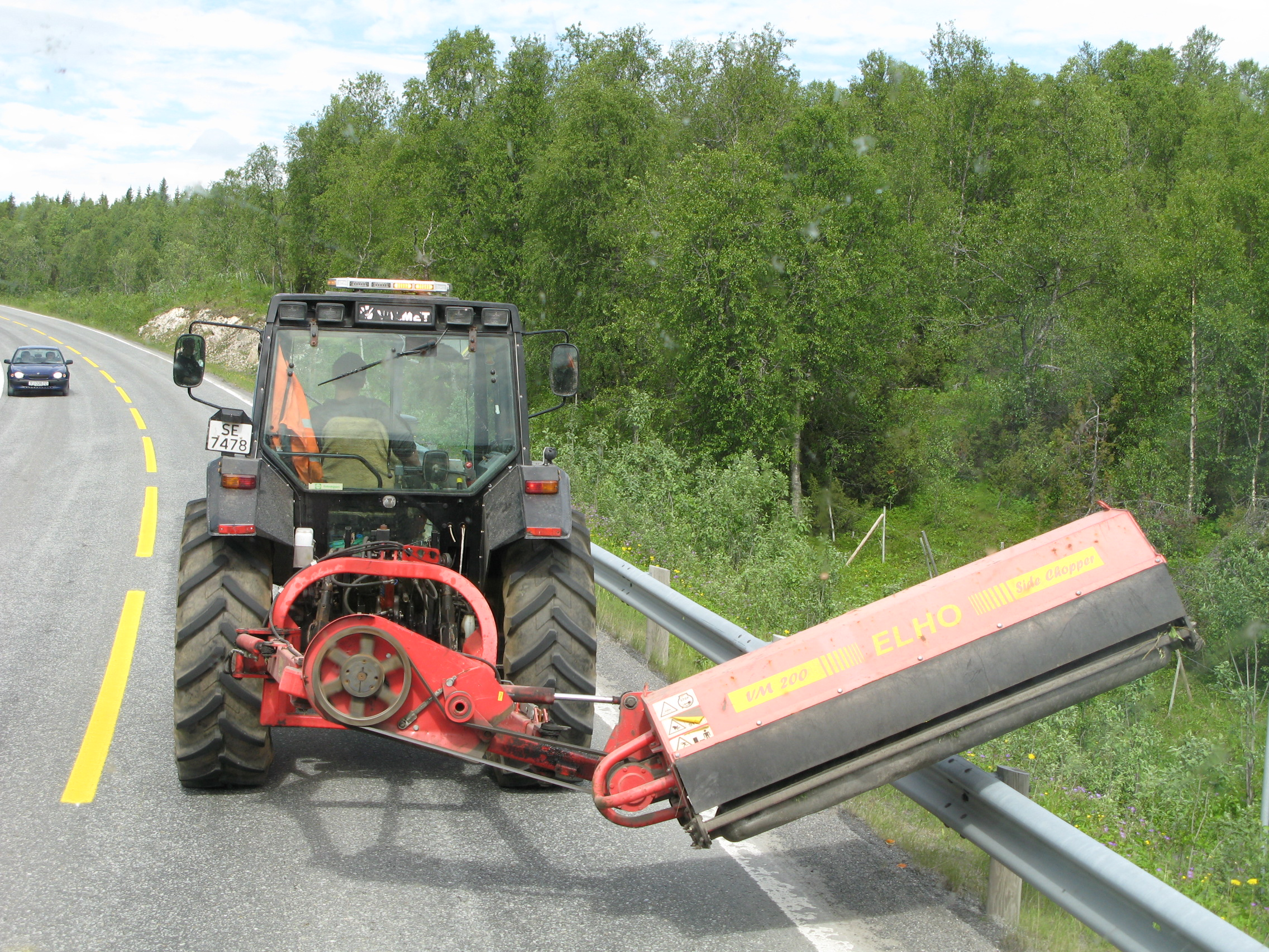 Traktorski priključek za košnjo trave